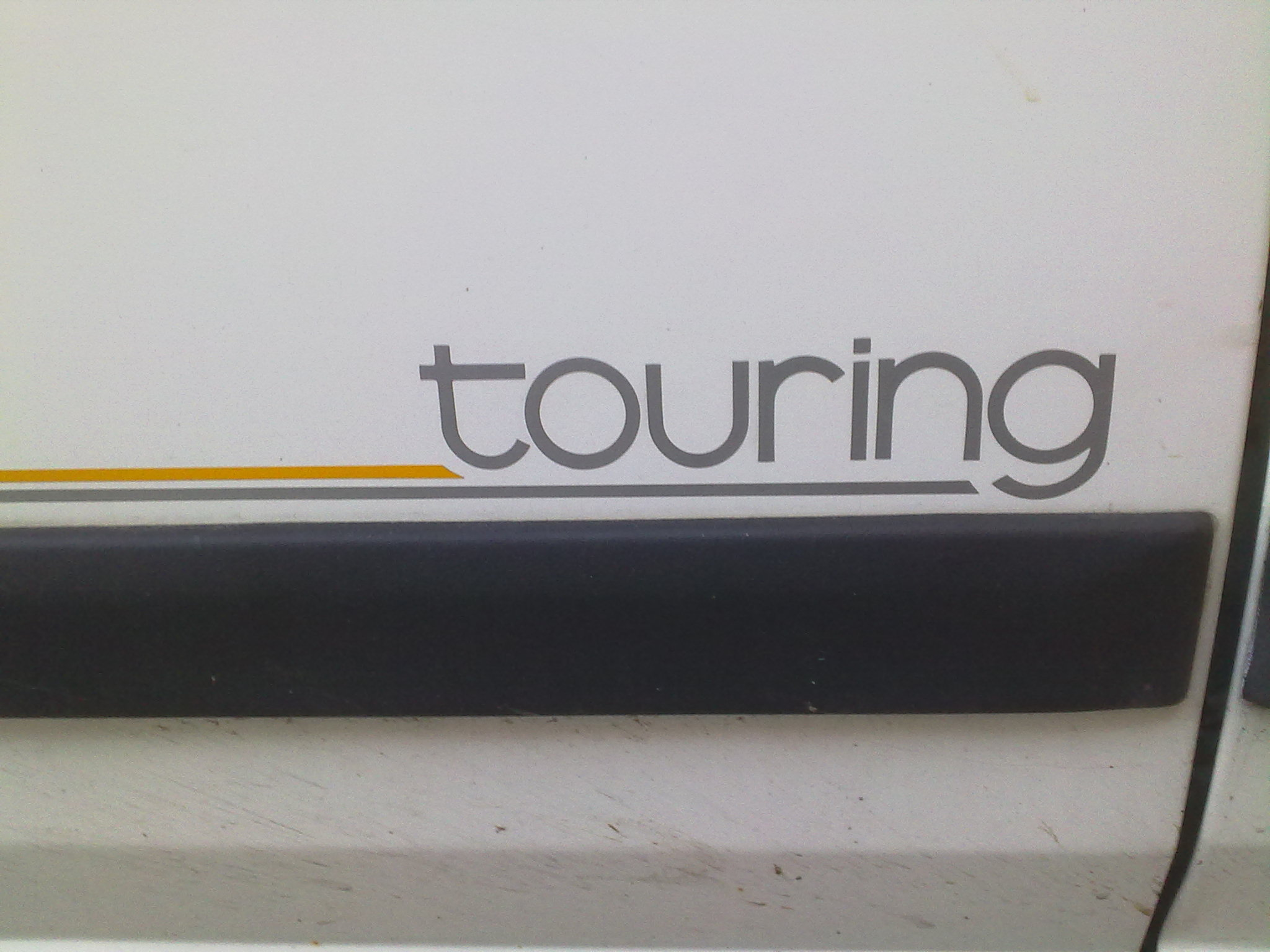 Logotipo que tiene esta version